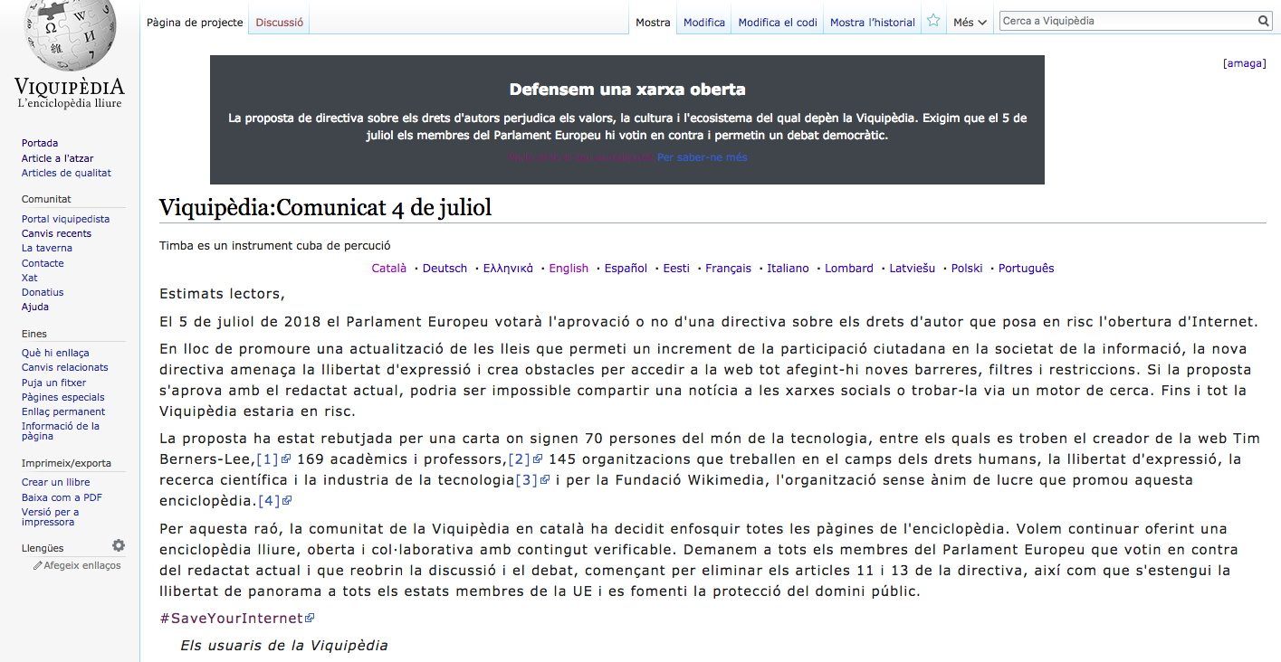 Viquipèdia el 4 de juliol de 2018. Text aclaridor en català.